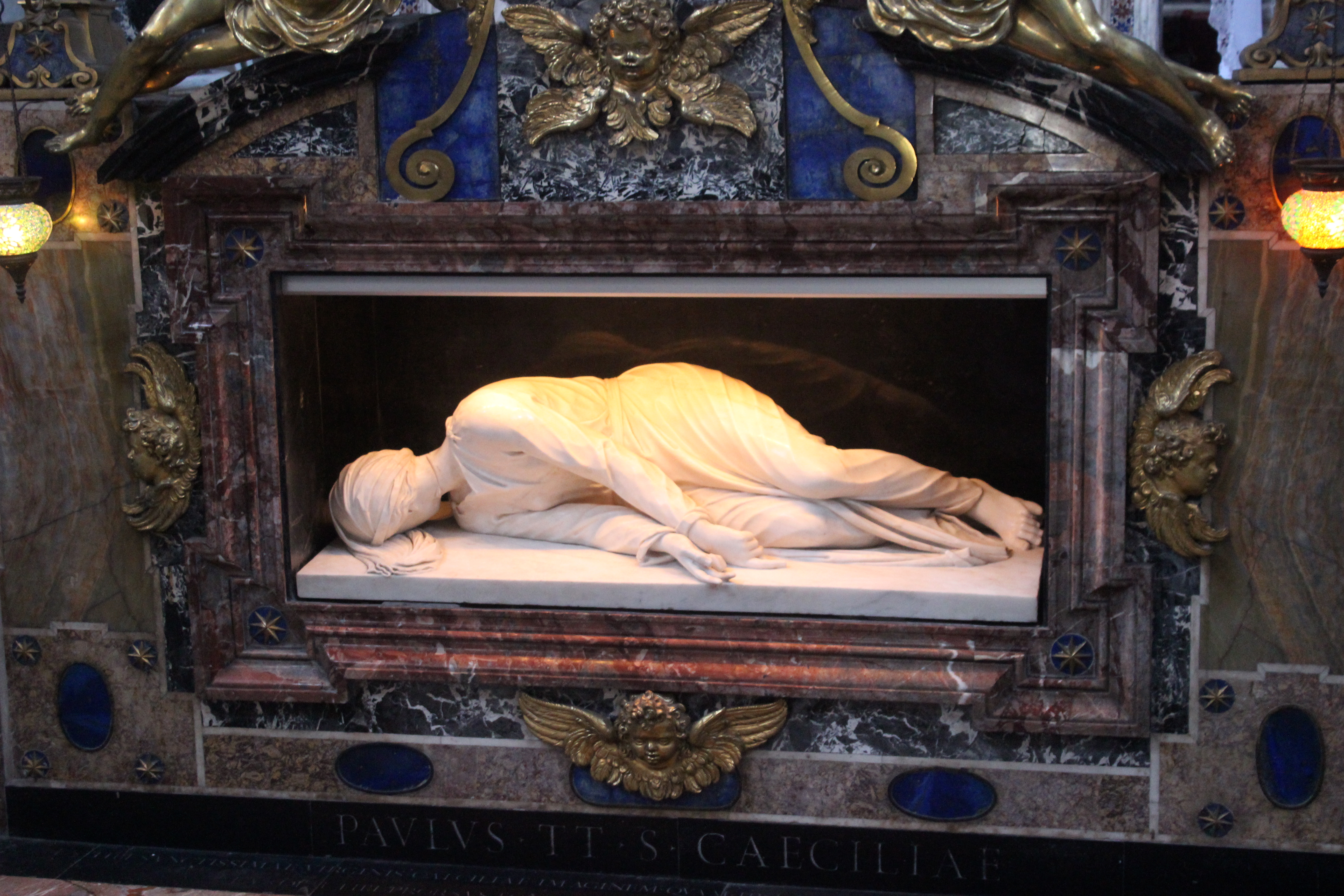 Stefano Maderno. Santa Cecilia. Roma, Santa Cecilia in Trastevere.